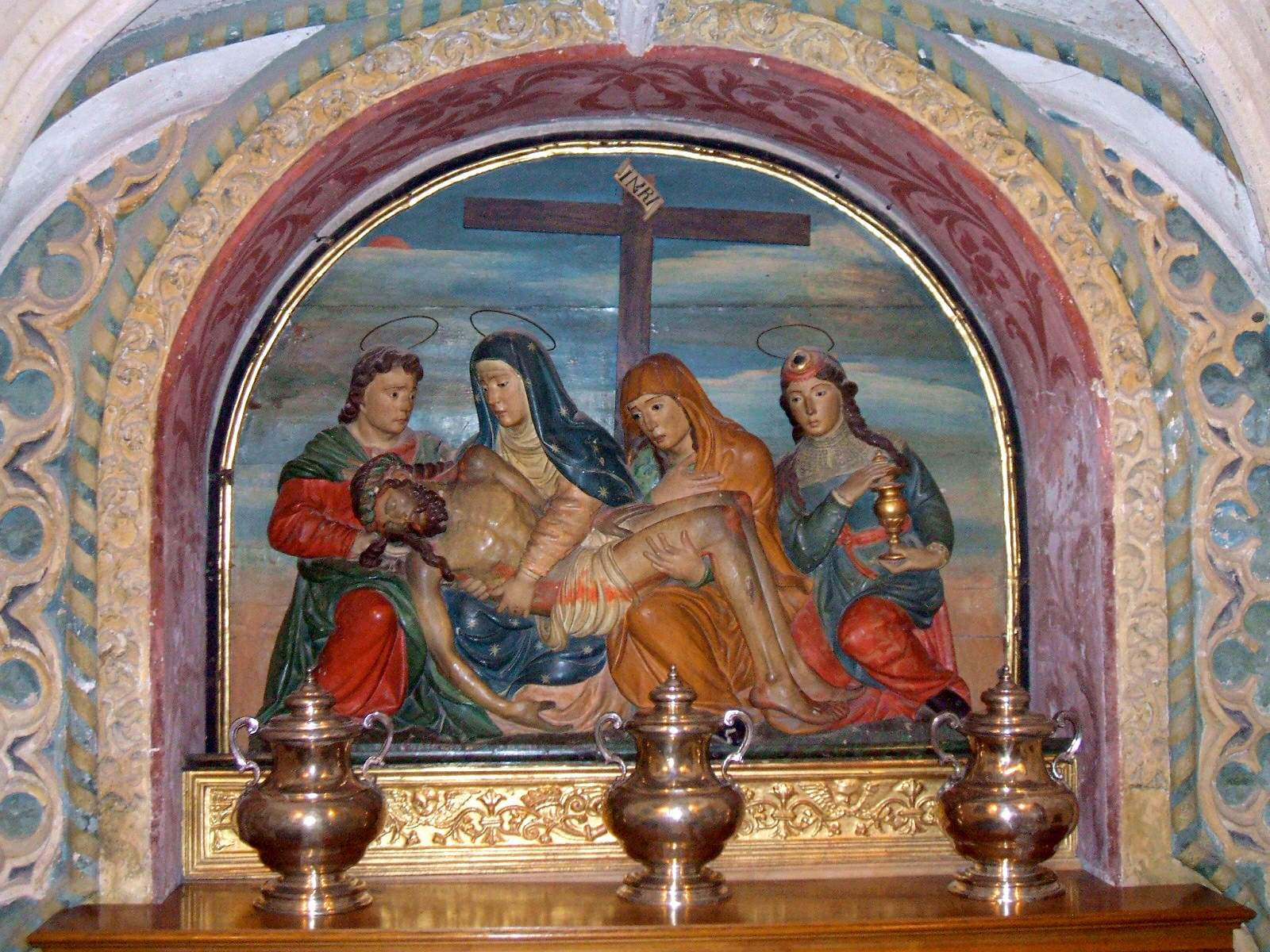 Capilla del Ángel de la Guarda o del Ángel Custodio de la Mezquita-catedral de Córdoba, (España).